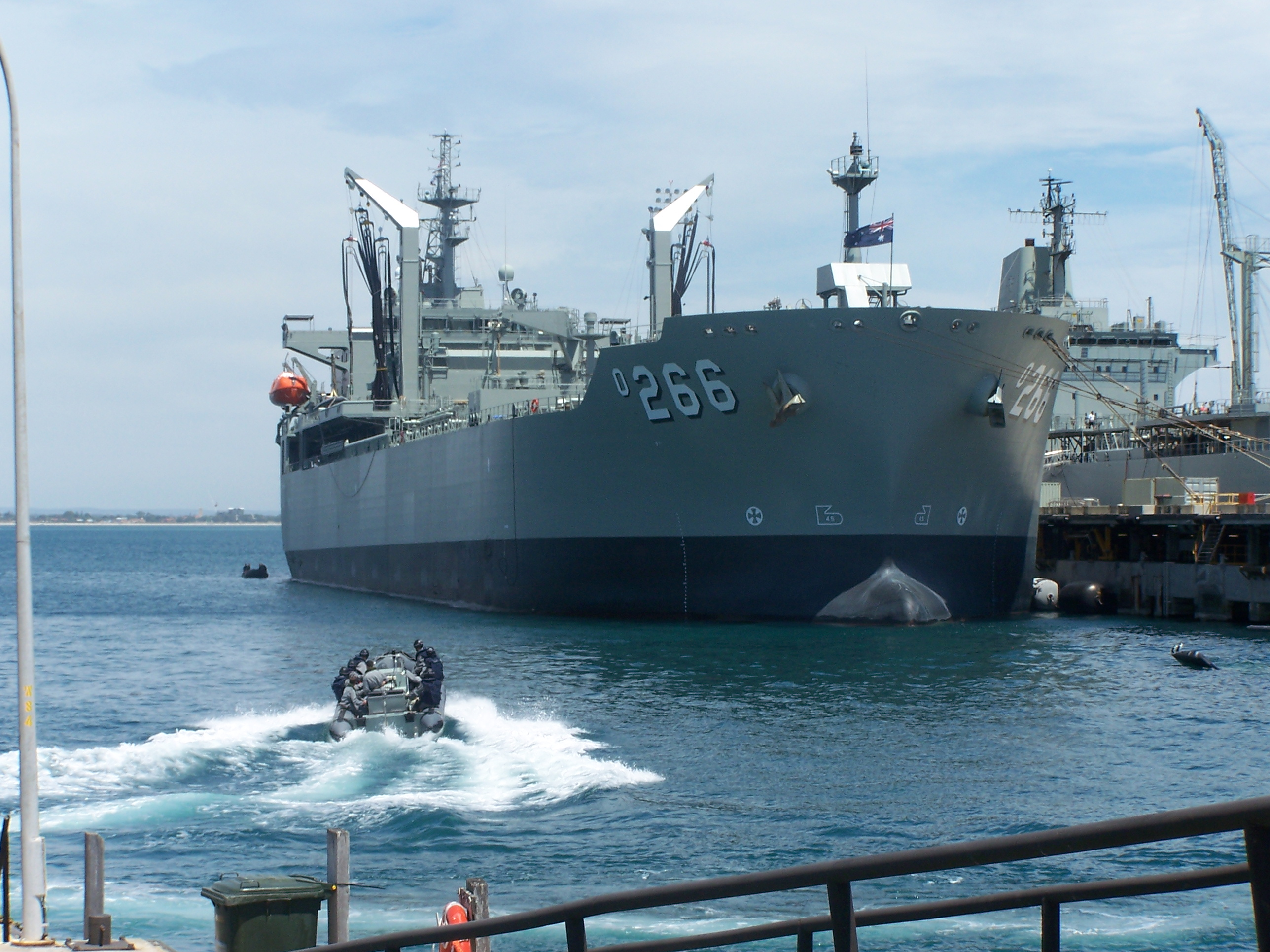 HMAS Stirling open day HMAS Sirius